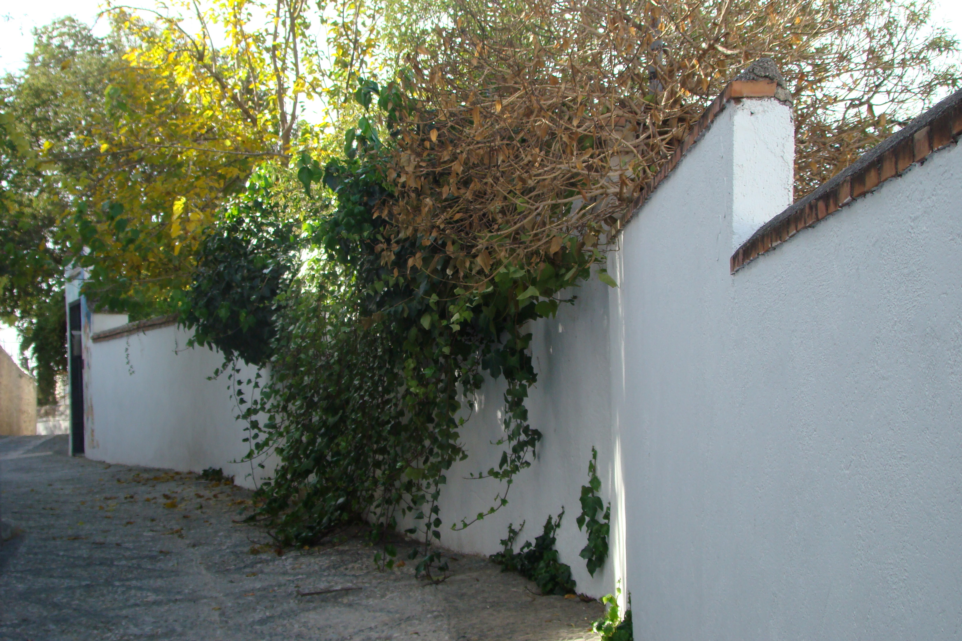 Ejemplo de tapias blanqueadas de cerramiento de un "carmen" en Granada